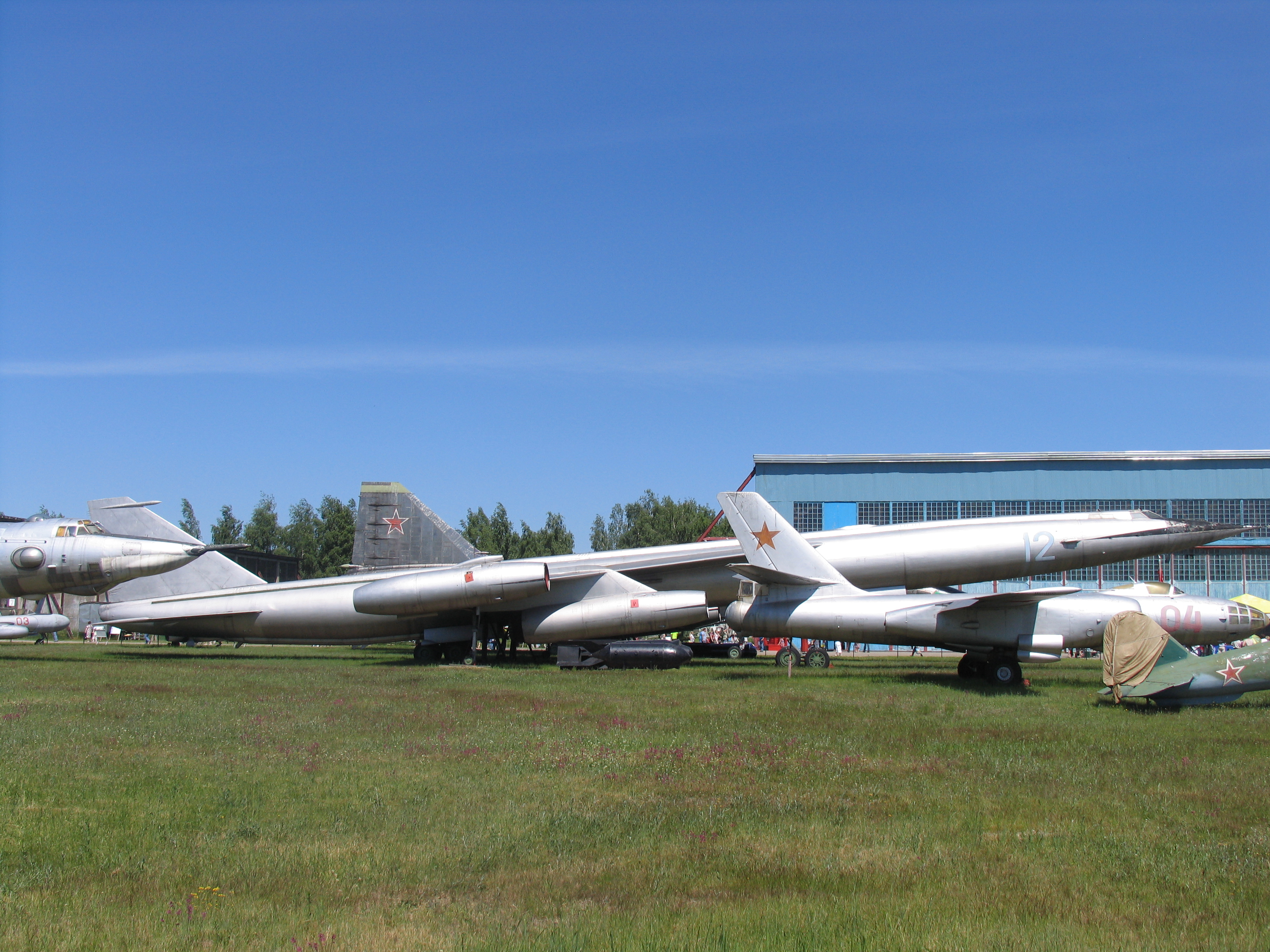 Стратегический бомбардировщик M-50 в музее ВВС. Вид сбоку.